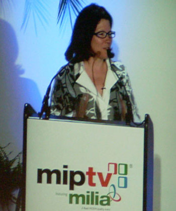 Jana Bennett at MIPTV Media Market